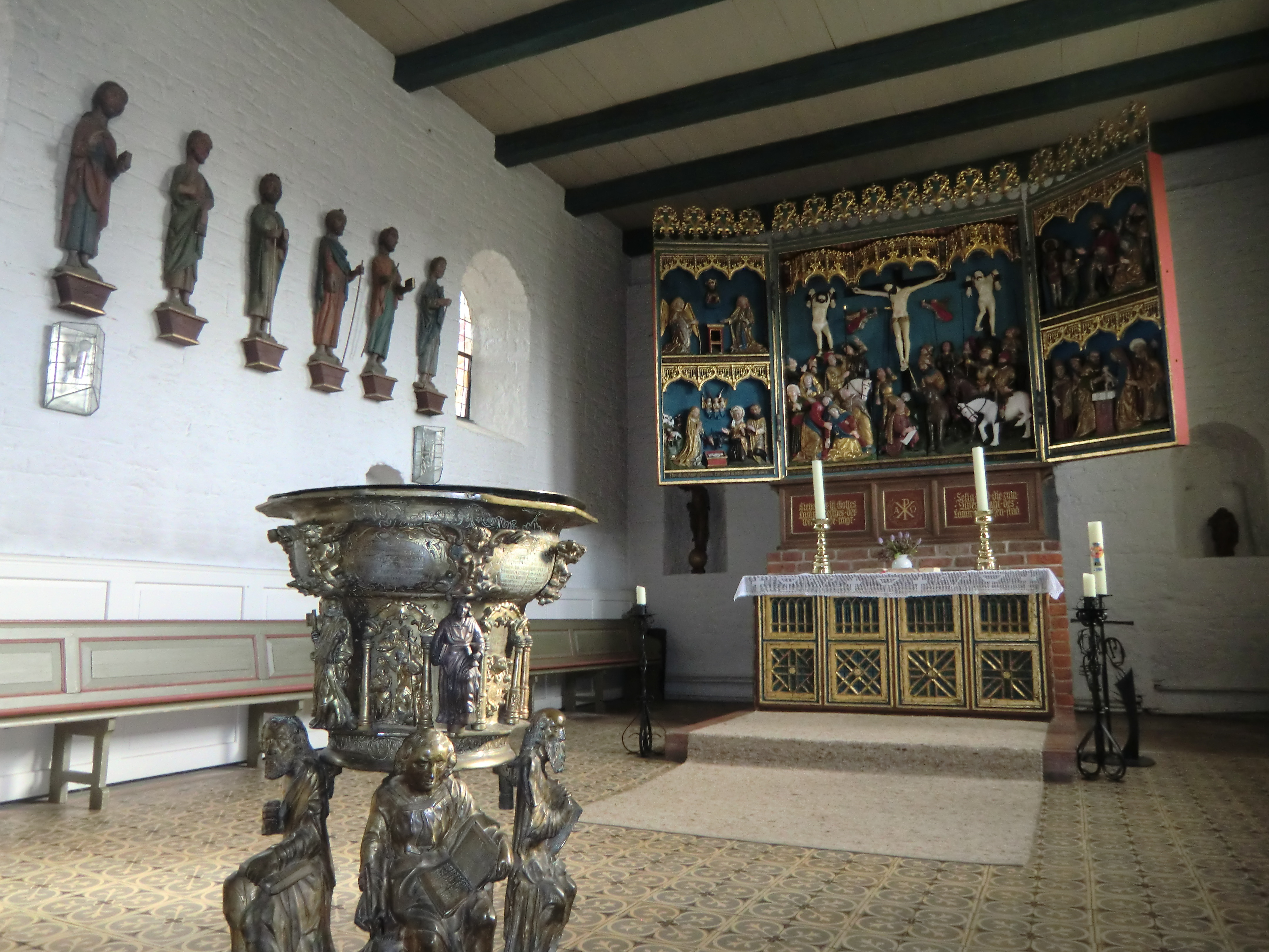 Altarraum